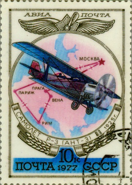 Stamp